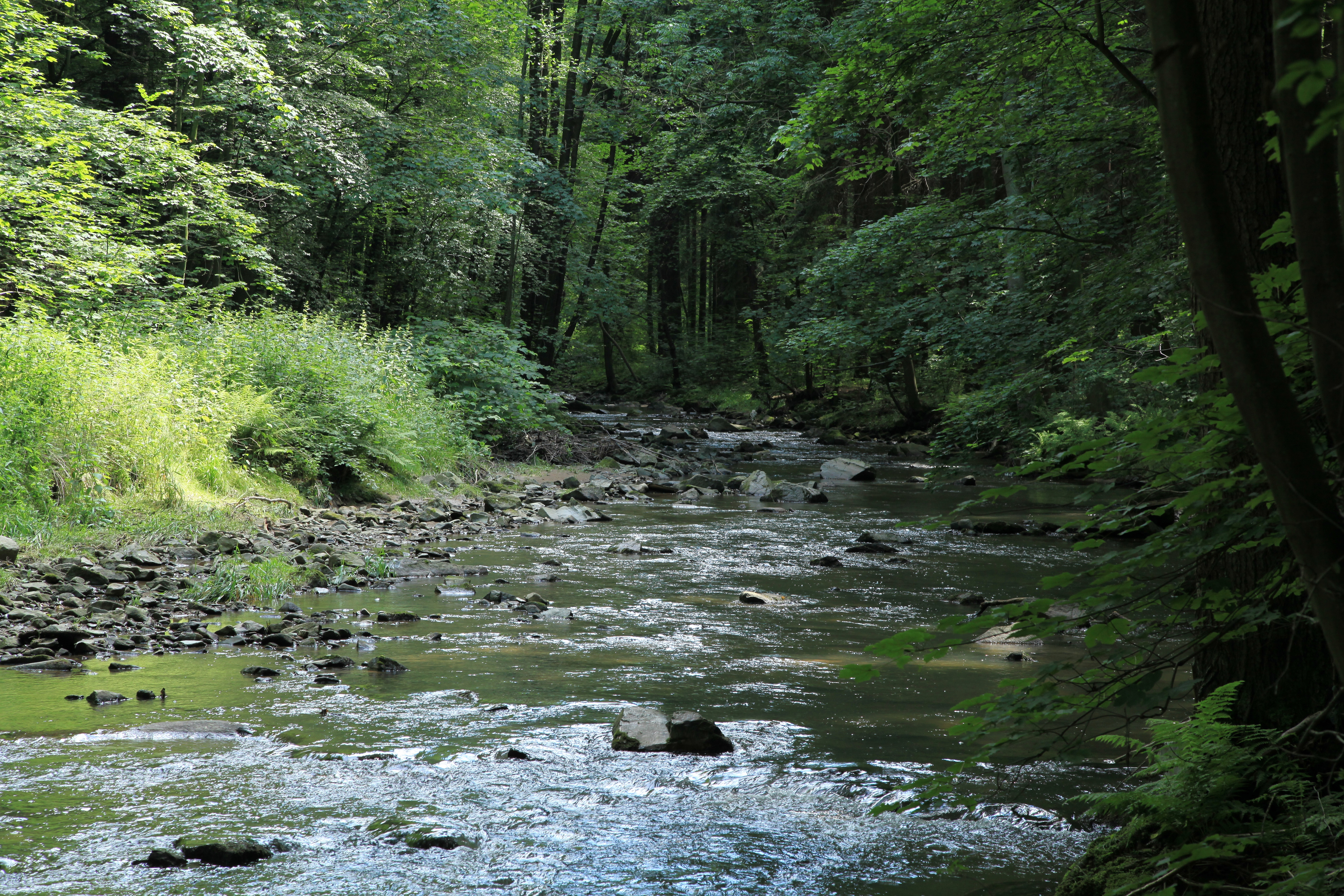 Löbauer Wasser in der Georgewitzer Skala in Löbau